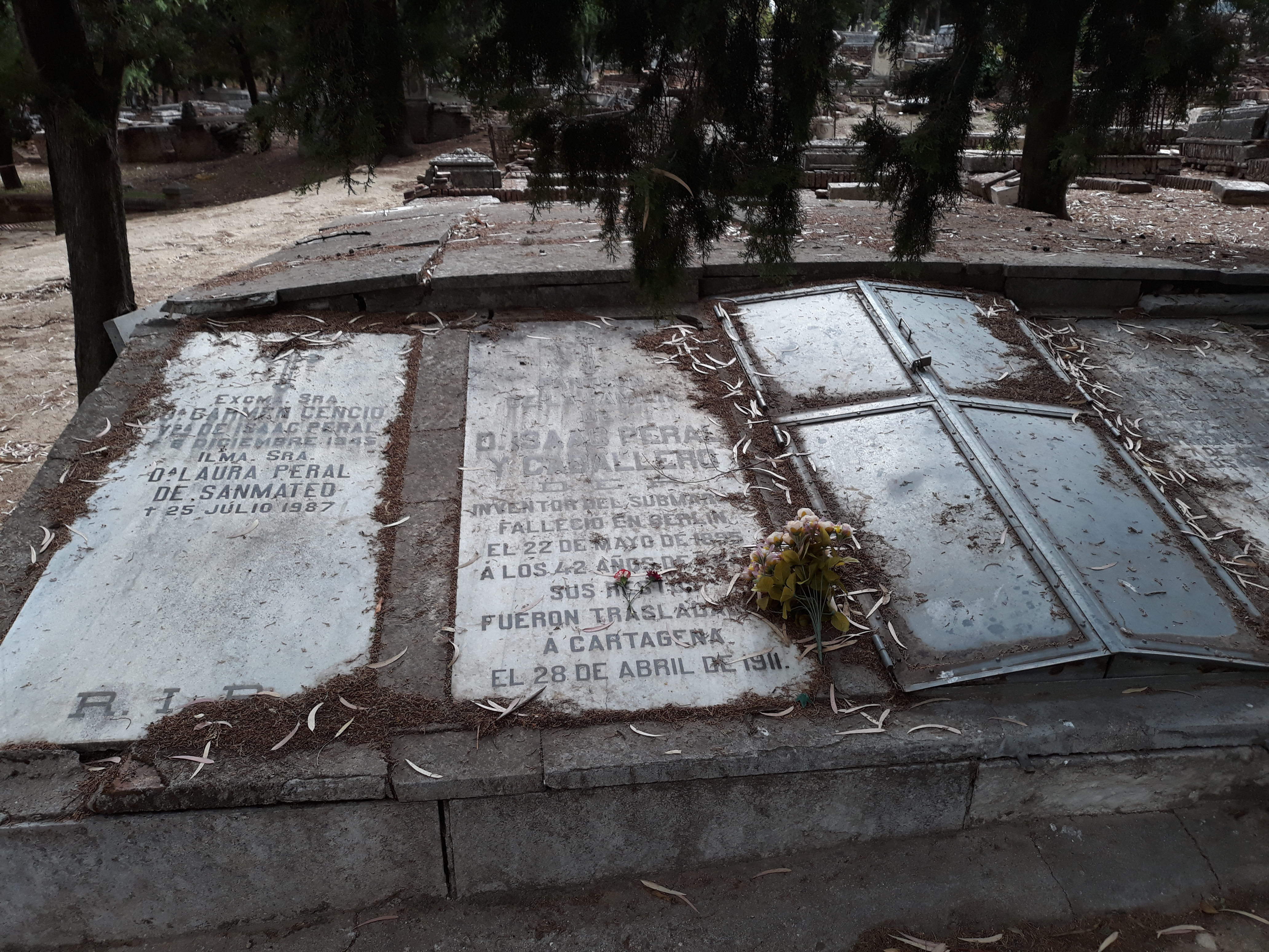 Das alte Grab des spanischen Marineoffiziers und Erfinders (U-Boot) Isaac Peral auf dem Almudena-Friedhof in Madrid.